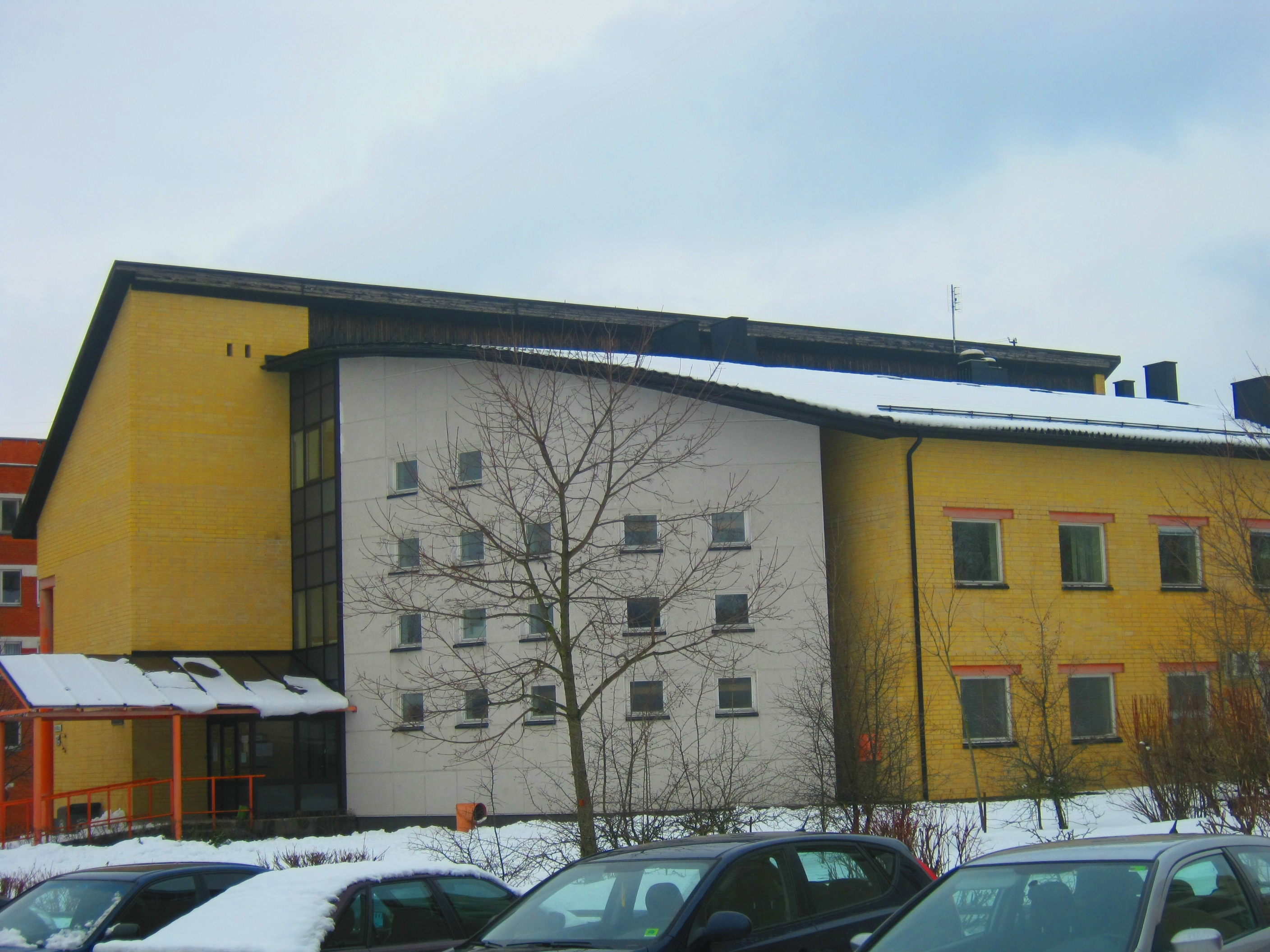 Lietuvos aklųjų biblioteka